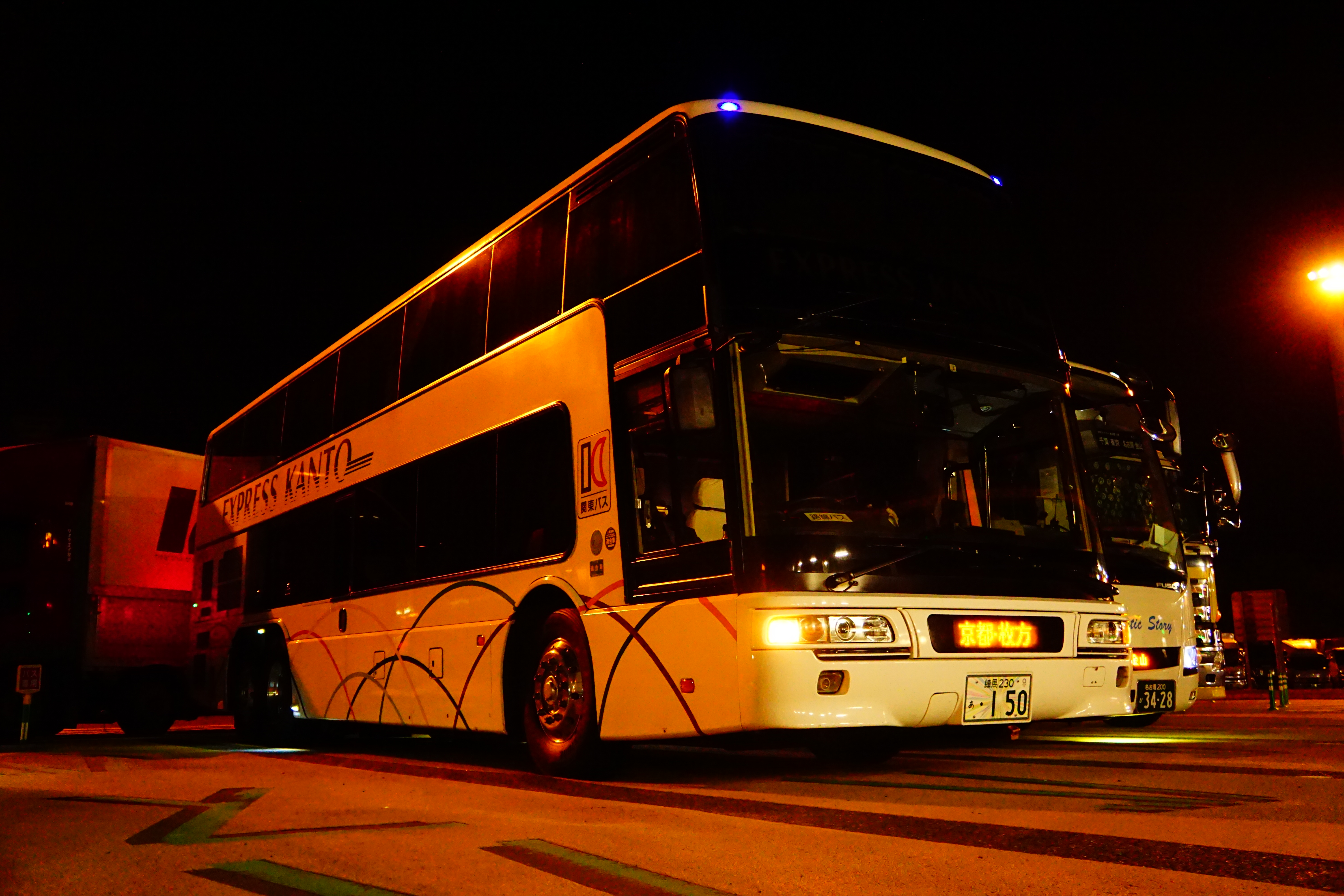 関東バス株式会社 「東京ミッドナイトエクスプレス京都号」京都・枚方行き 登録番号 : 練馬230あ・0150 所属 : 丸山営業所 撮影場所 : 足柄サービスエリア 下り 撮影日 : 2019年5月10日 投稿者が撮影